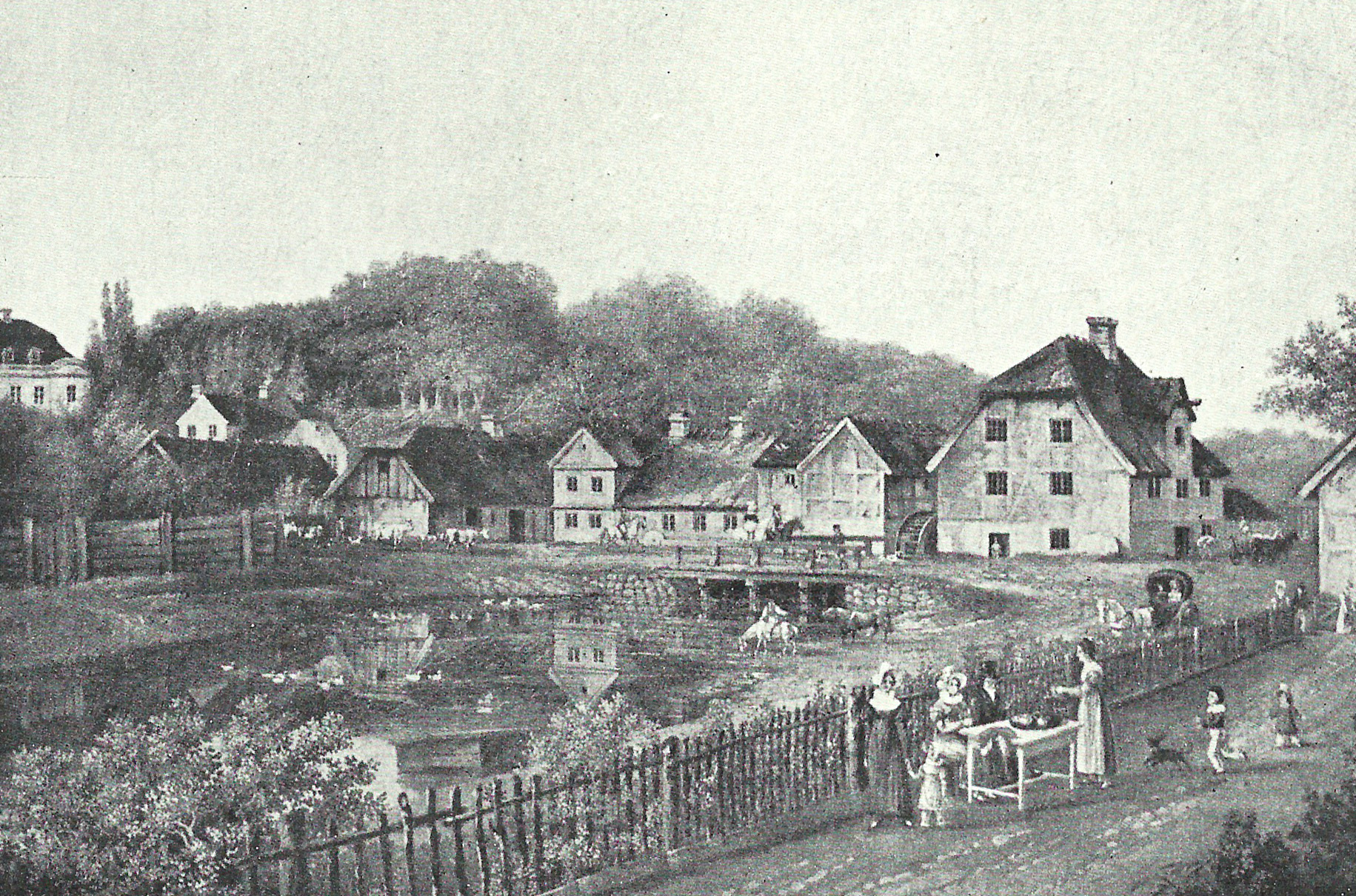 Mølleåen ved Frederiksdal i begyndelsen af 19. århundrede. Maleri, Til venstre slottet, i midten møllen og i forgrunden beværtningshaven.